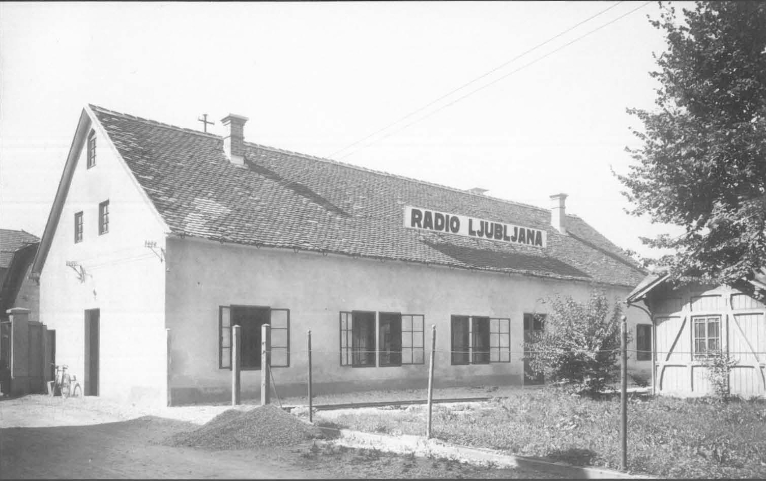 Stavba studia Ijubljanske radijske postaje na Bleiweisovi cesti 1928